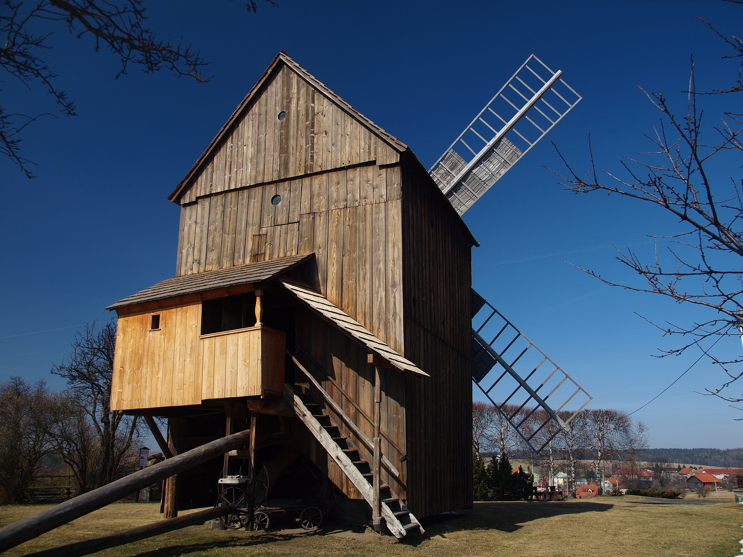 Větrný mlýn (Partutovice), Partutovice 78